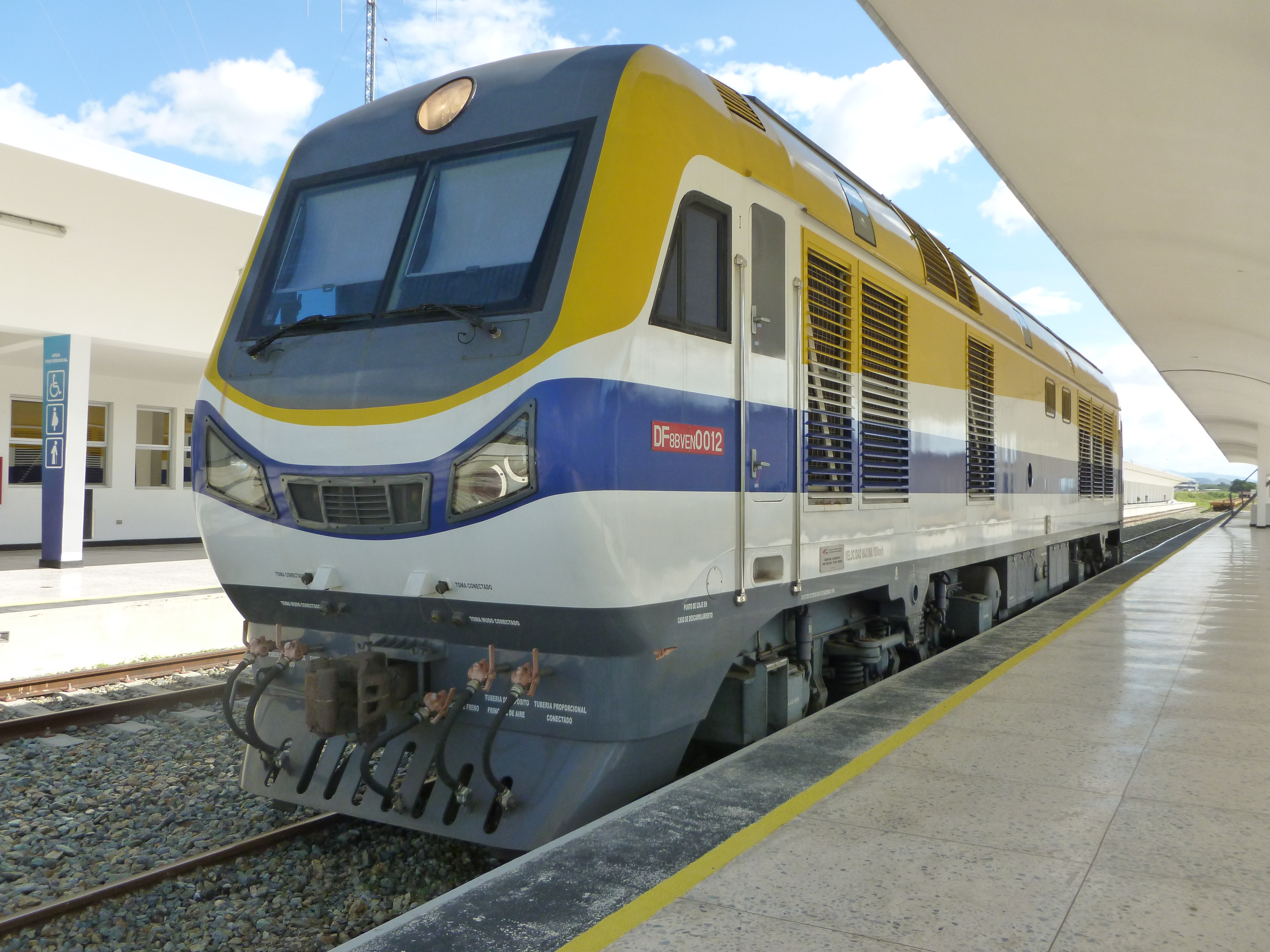 Locomotora de carga df8ven de fabricación china para el tramo Simón Bolívar Venezuela.